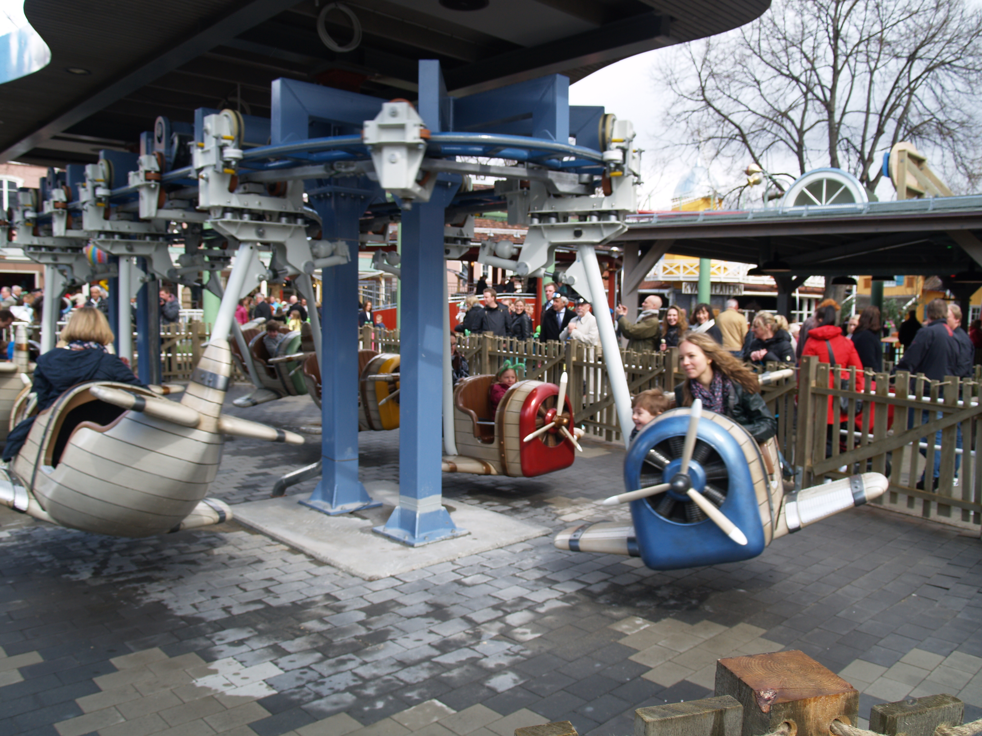 Åkattraktionen Flygis i nöjesparken Liseberg, Göteborg.